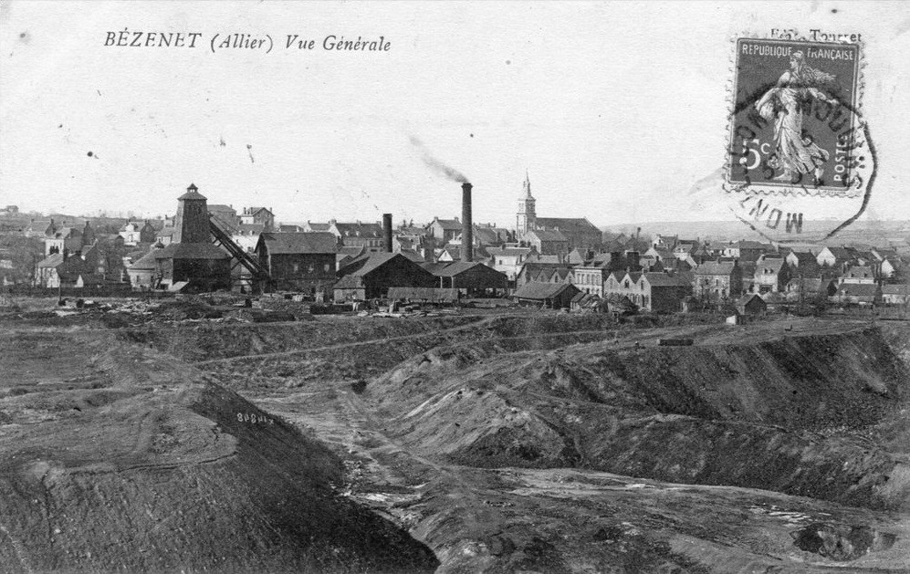 Le puits Sainte-Barbe des houillères de Bézenet.